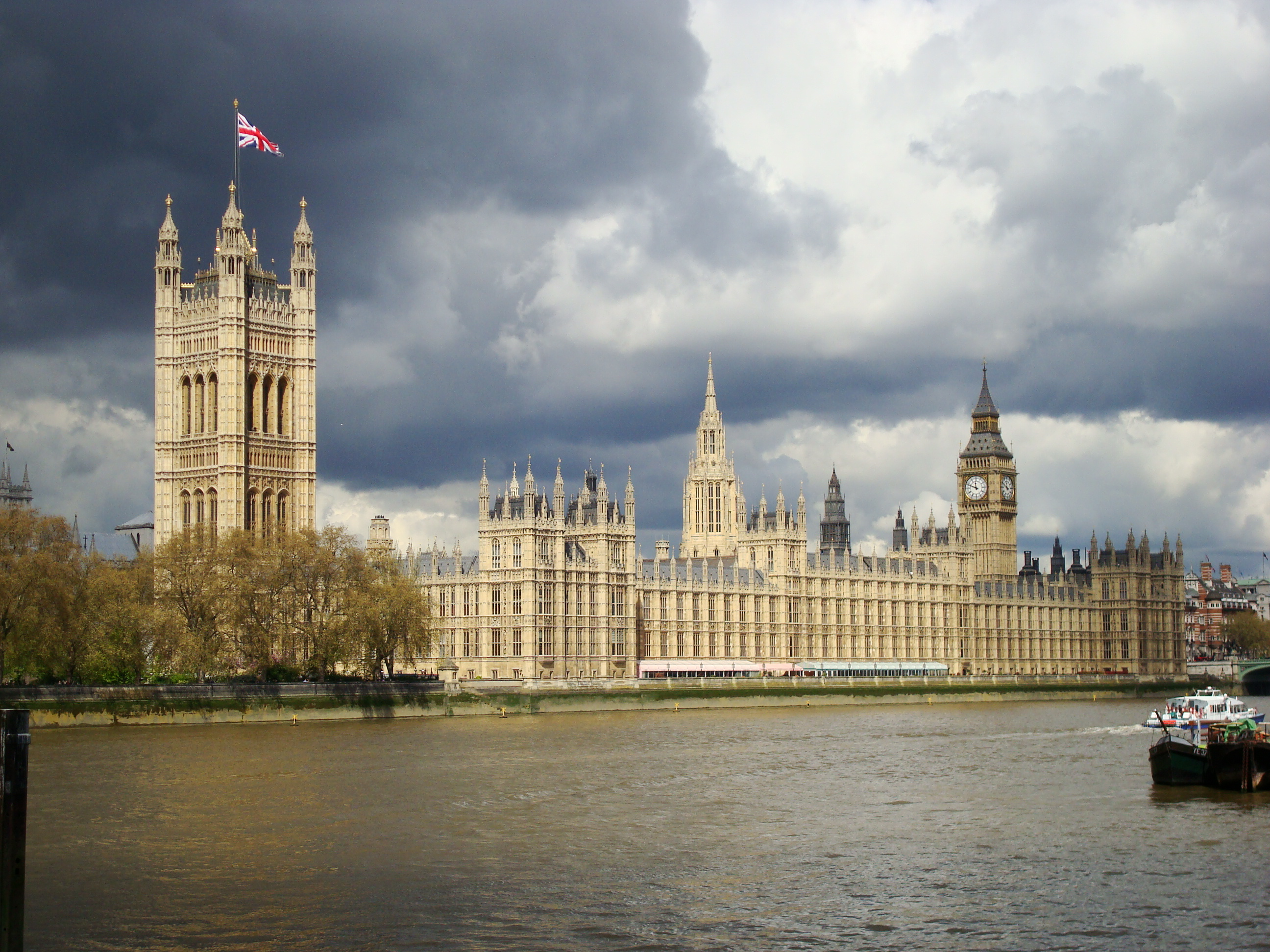 Casas del Parlamento. Palacio de Westminster